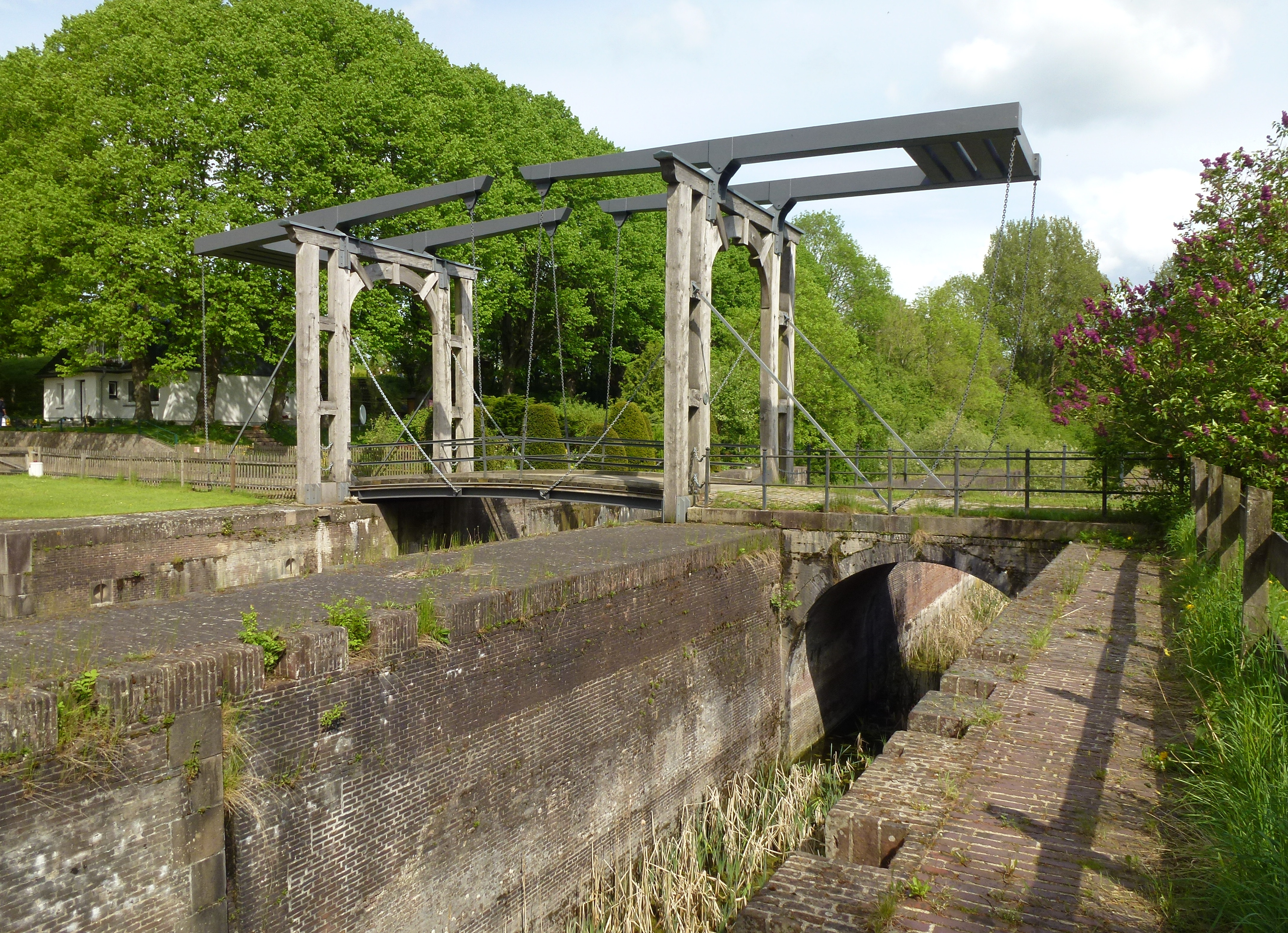 Eiderkanalschleuse bei Krummwisch